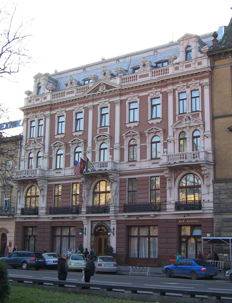 Гранд Отель во Львове